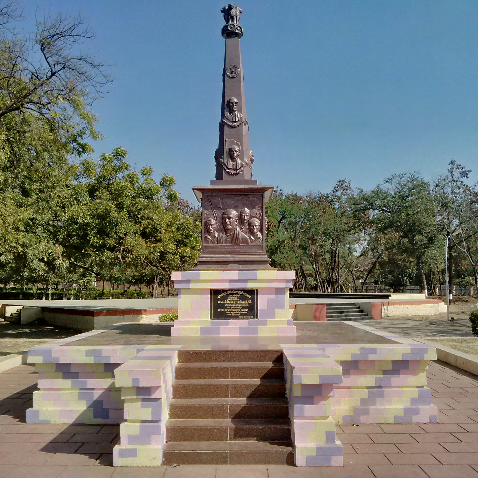 Marathwada Martyr Monument, at Marthwada Mukti Sangram Park, Parbhani